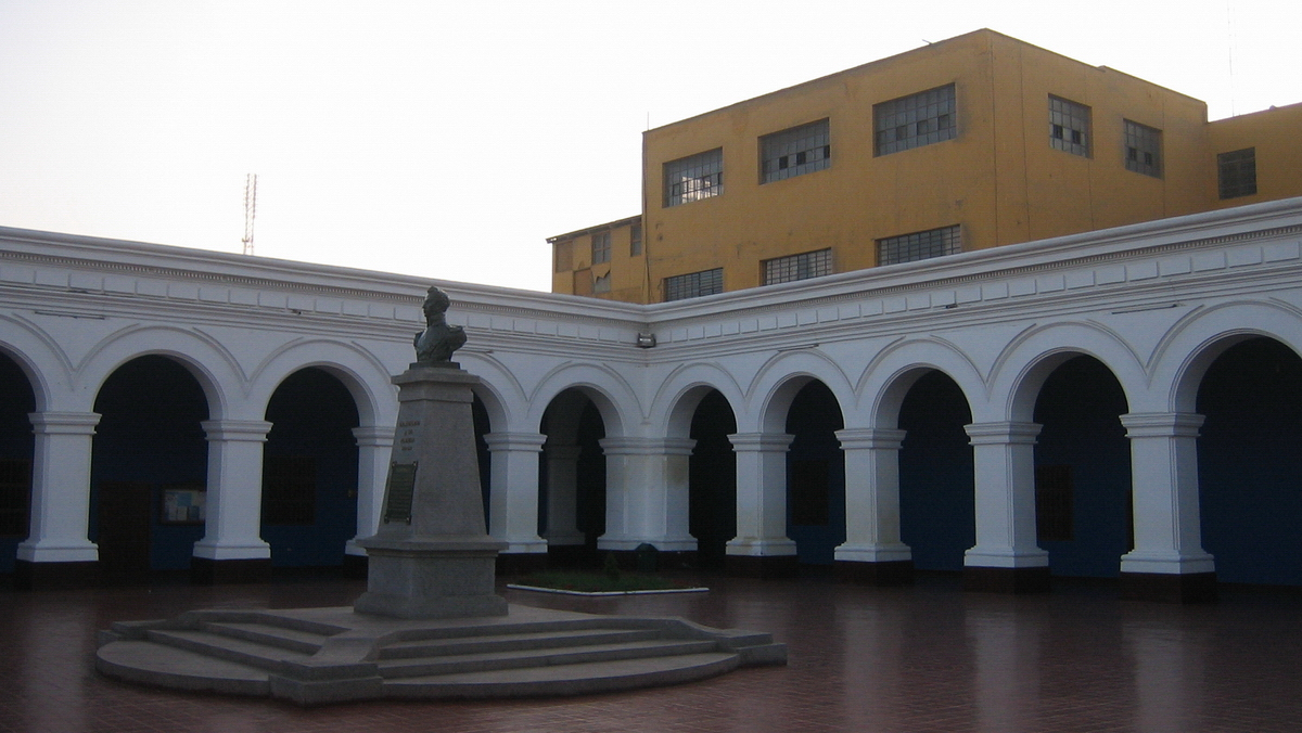 Patio principal en el local antíguo de la Universidad Nacional de Trujillo en el centro de la ciudad.